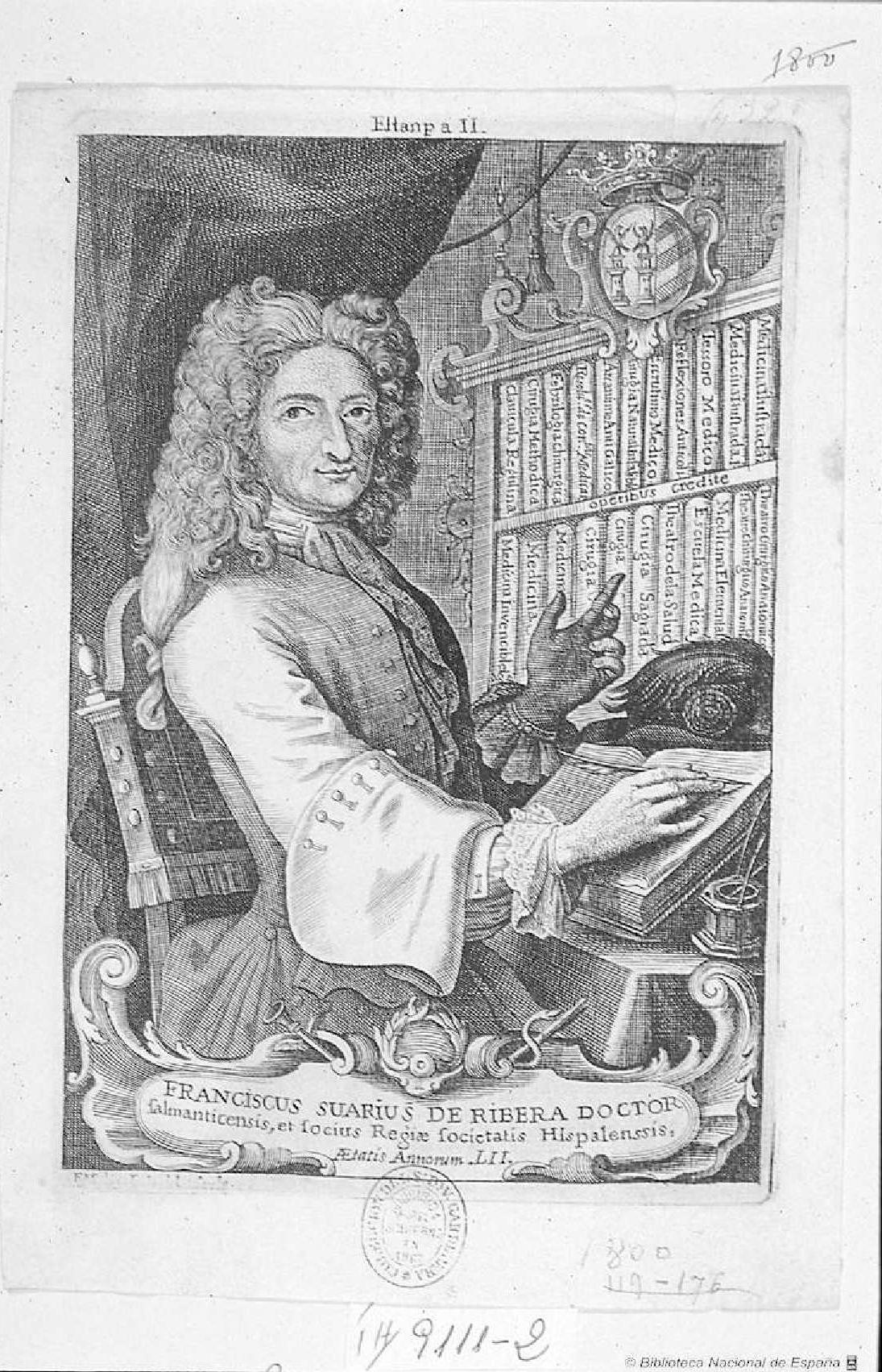 Retrato de Francisco Suarez de Ribera. Prueba suelta de la Colección Carderera Autor: Irala, Matías de (1680-1753) Tipo de Documento: Dibujos, grabados y fotografías